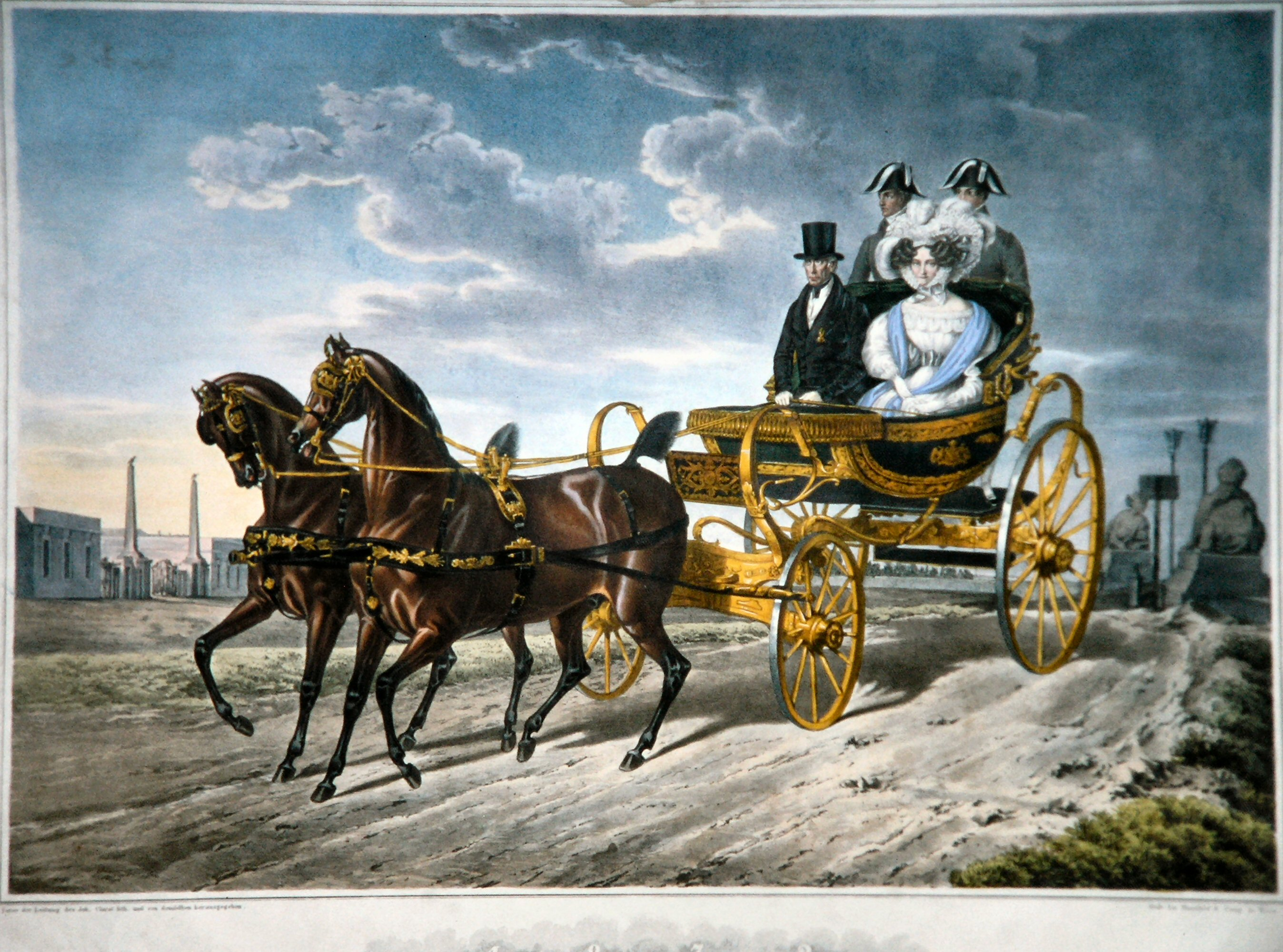 Kaiser Franz I. von Österreich und seine Gattin Karoline Auguste. Lithographie von Johann Baptist Clarot, ca.1830